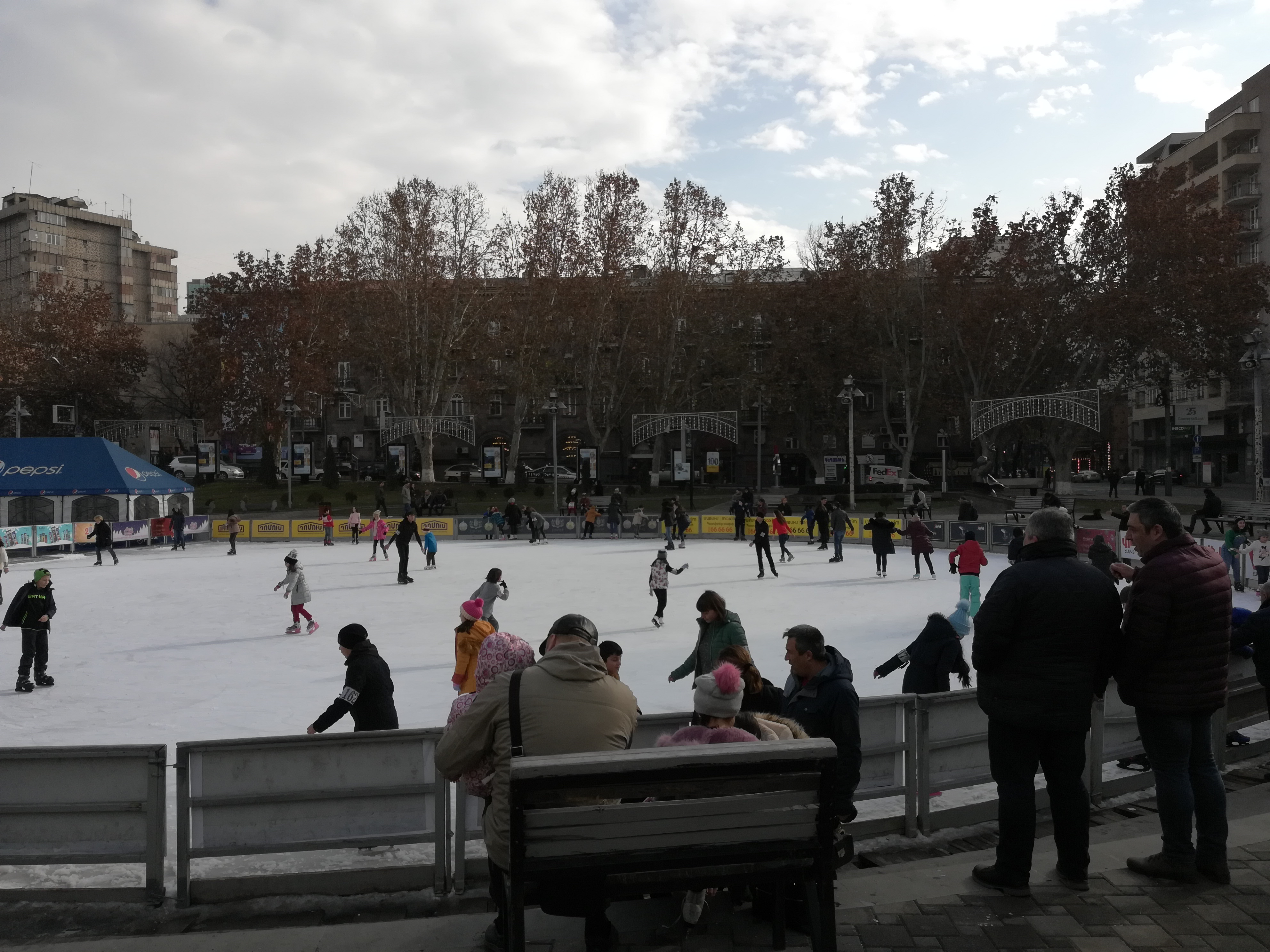 Ереван